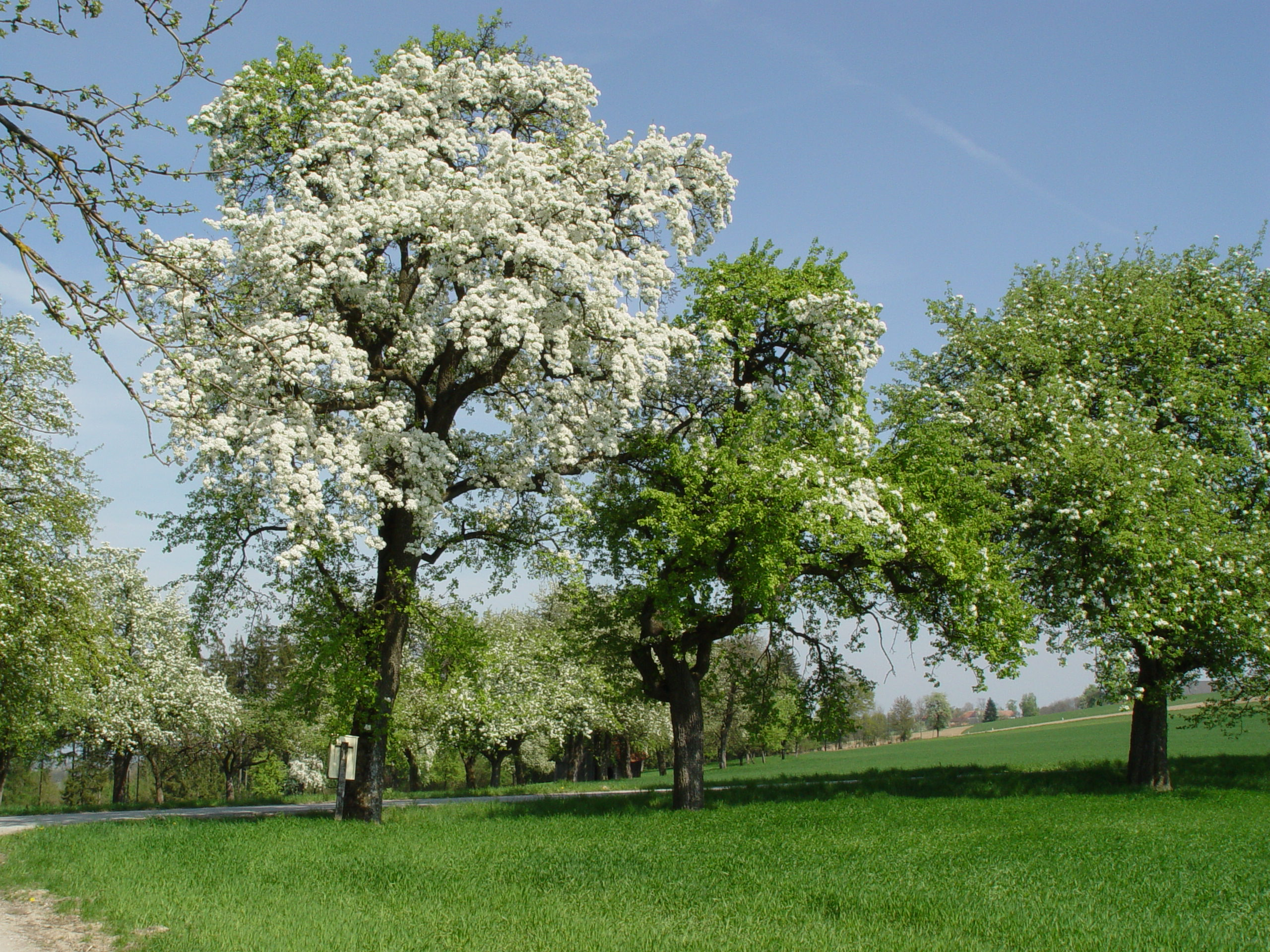 Obstbaumblüte im Naturpark Obst-Hügel-Land (Finklham)